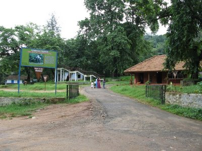 കോന്നി ആനക്കൂടിലേക്കുള്ള പ്രവേശന കവാടം